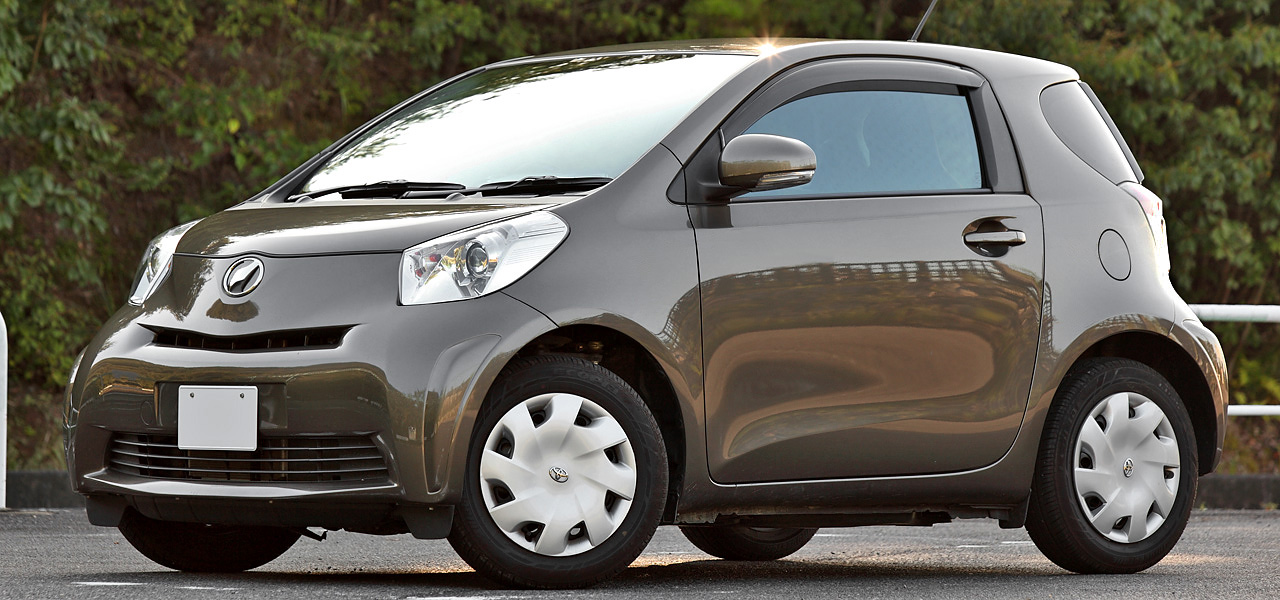 Toyota iQ.